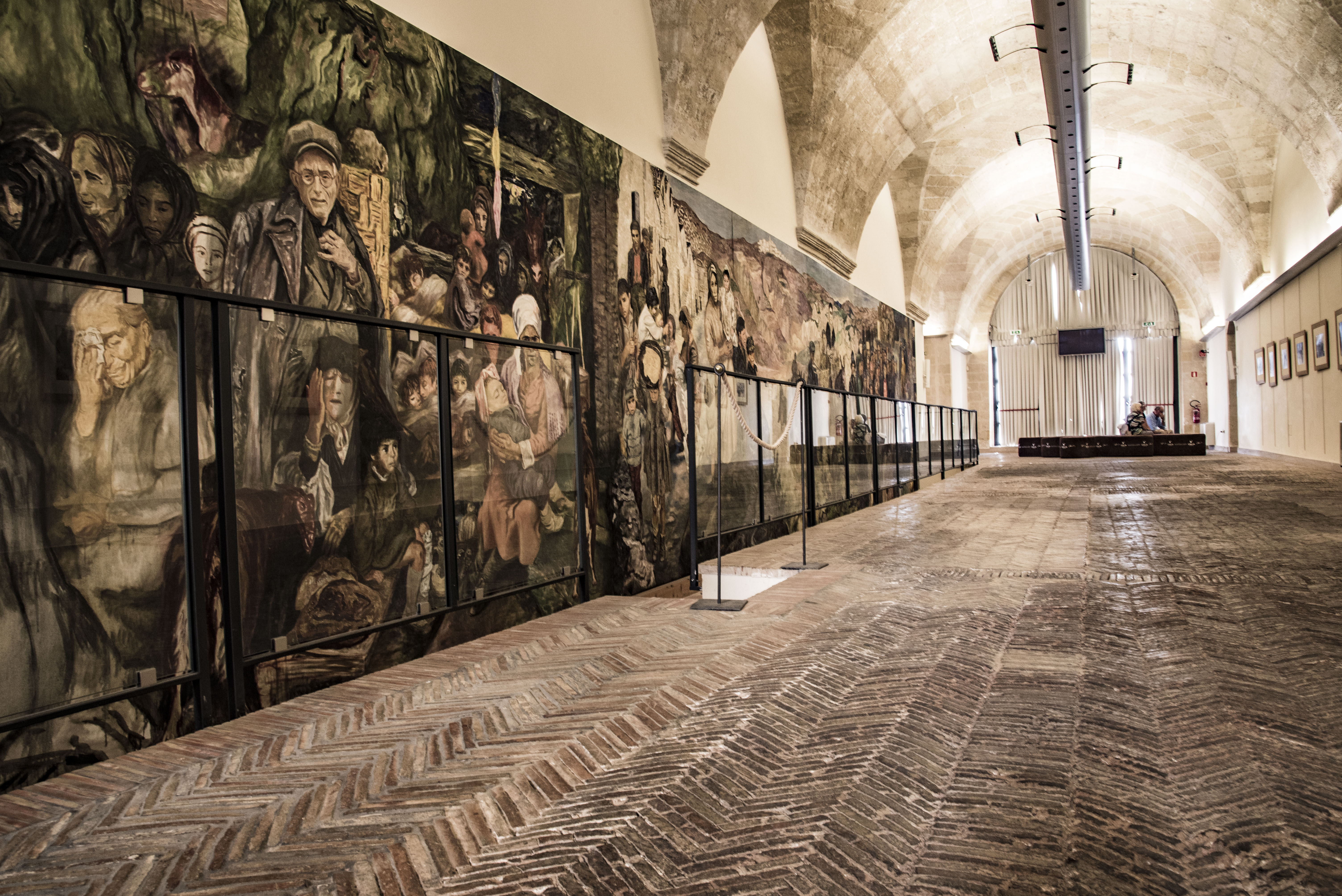 Dipinto di Carlo Levi-Palazzo Lanfranchi This is a photo of a monument which is part of cultural heritage of Italy.